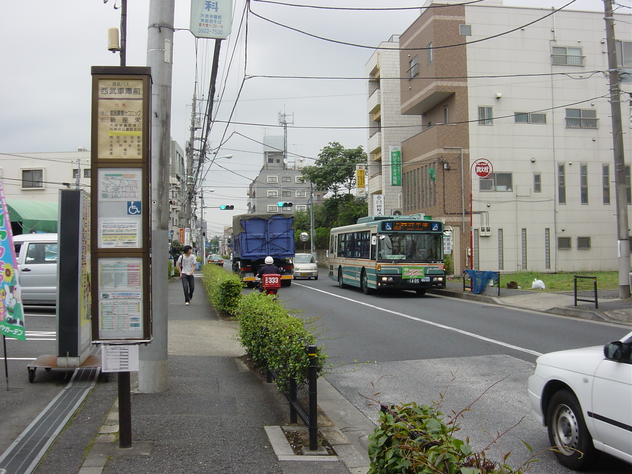 東京都練馬区石神井台6丁目16番地1号に所在する西武車庫前バス停。吉61-3系統新座栄発西武車庫行のA5-80号車(日デ西工ADG-RA273KAN)が上り降車専用バス停に到着したところ。